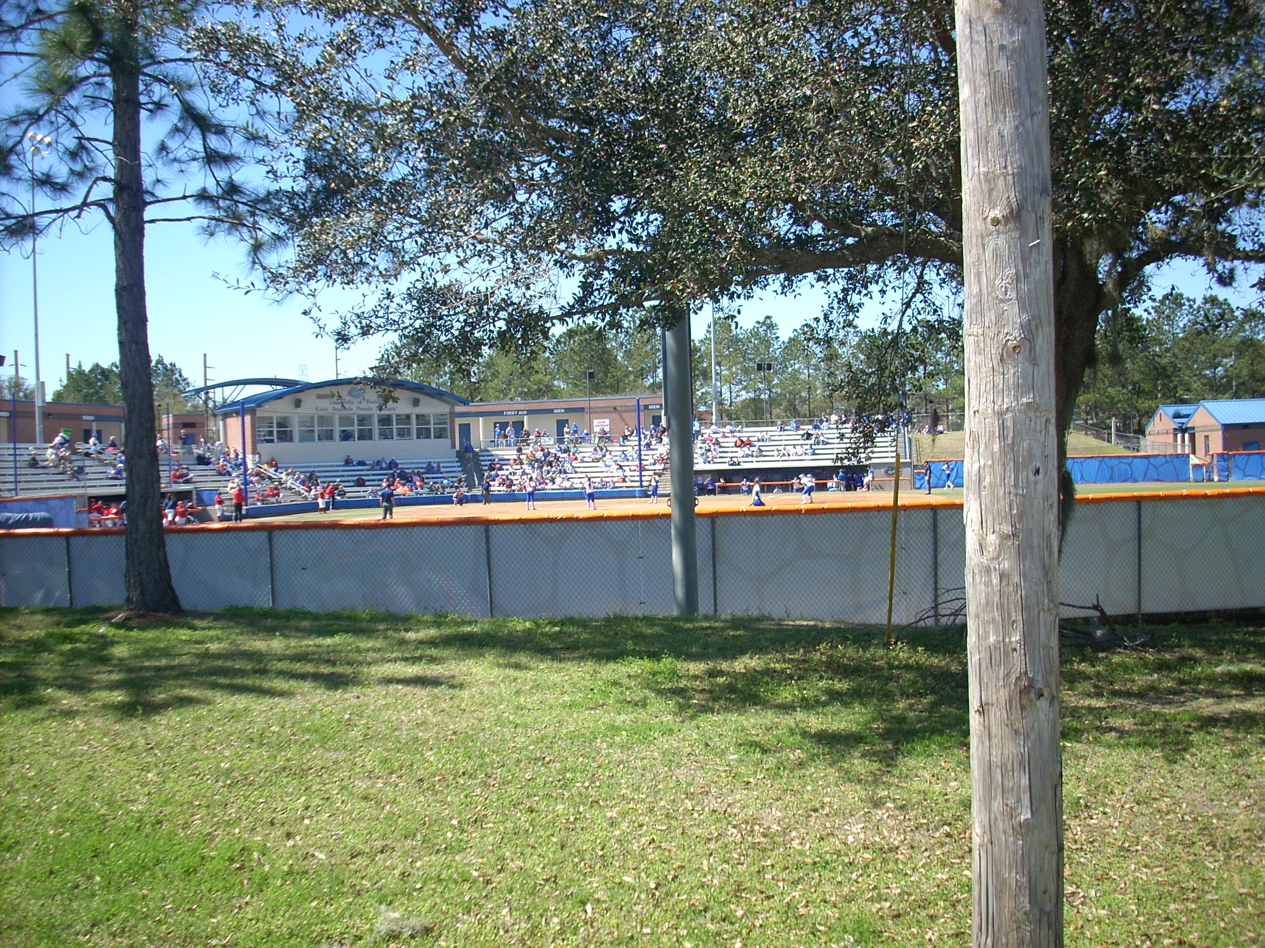 מגרש ספורט באוניברסיטת פלורידה